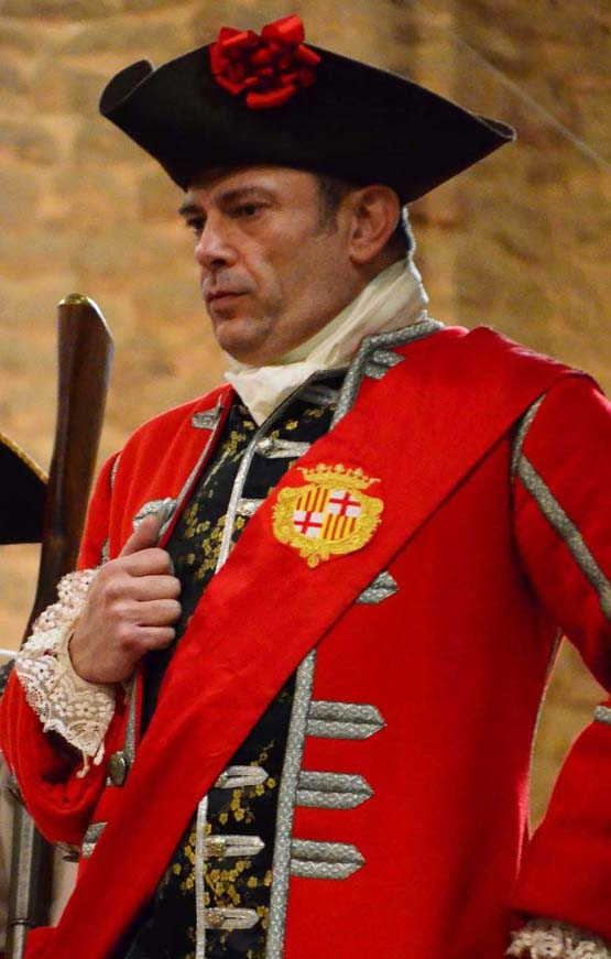 Recreació de l'uniforme de Rafael Casanova el 1714